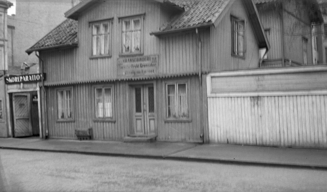 Industrigata 47 i 1937. Trehuset er siden revet og erstattet med en bygård.